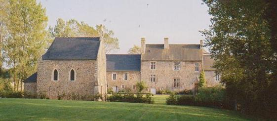 Vue d'ensemble du Manoir de Saint-Ortaire (propriété privée). 50620 Le Dézert, Normandie, France. Photo prise et publiée par les propriétaires du domaine.